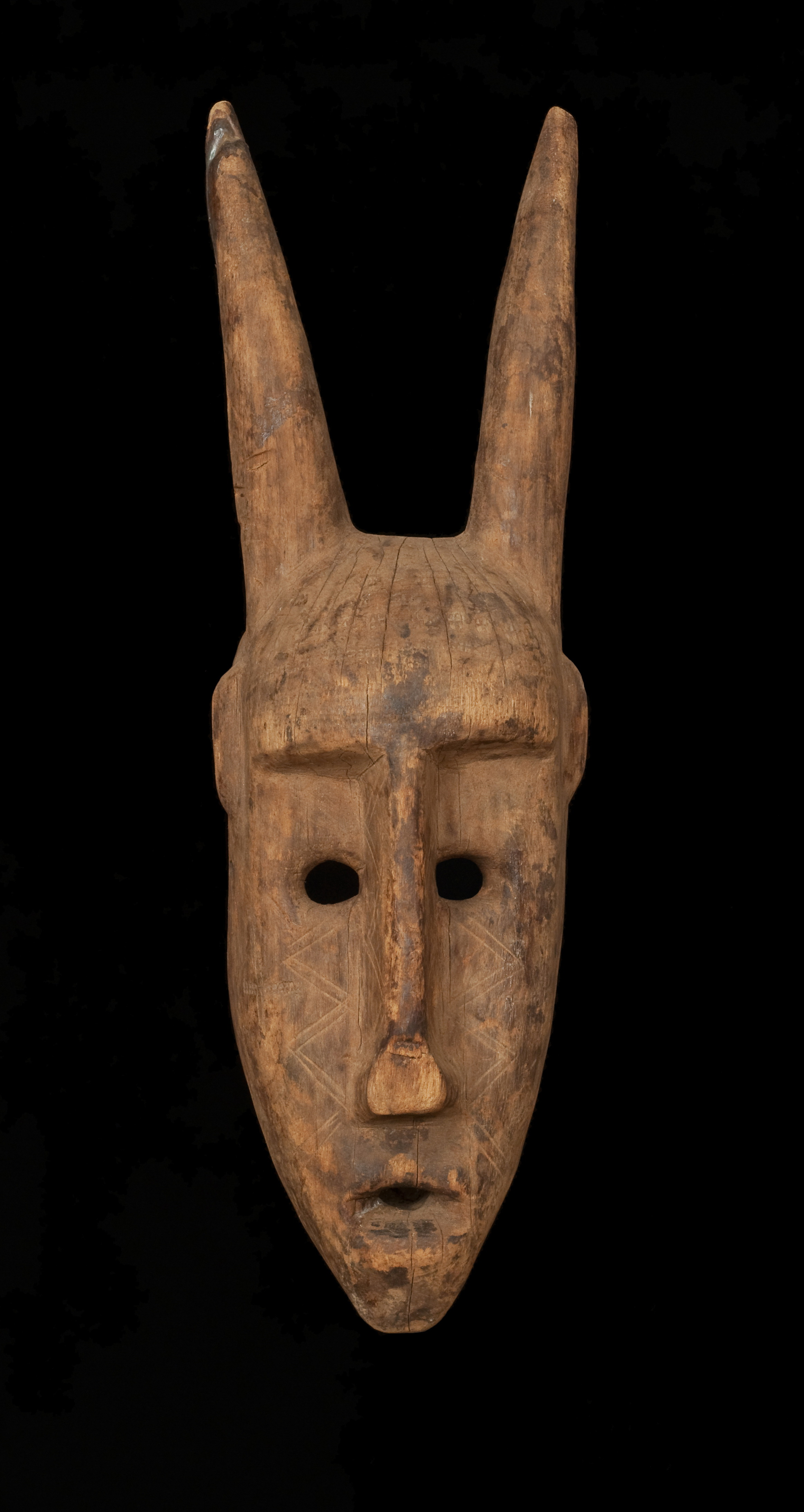 Masque Bambara